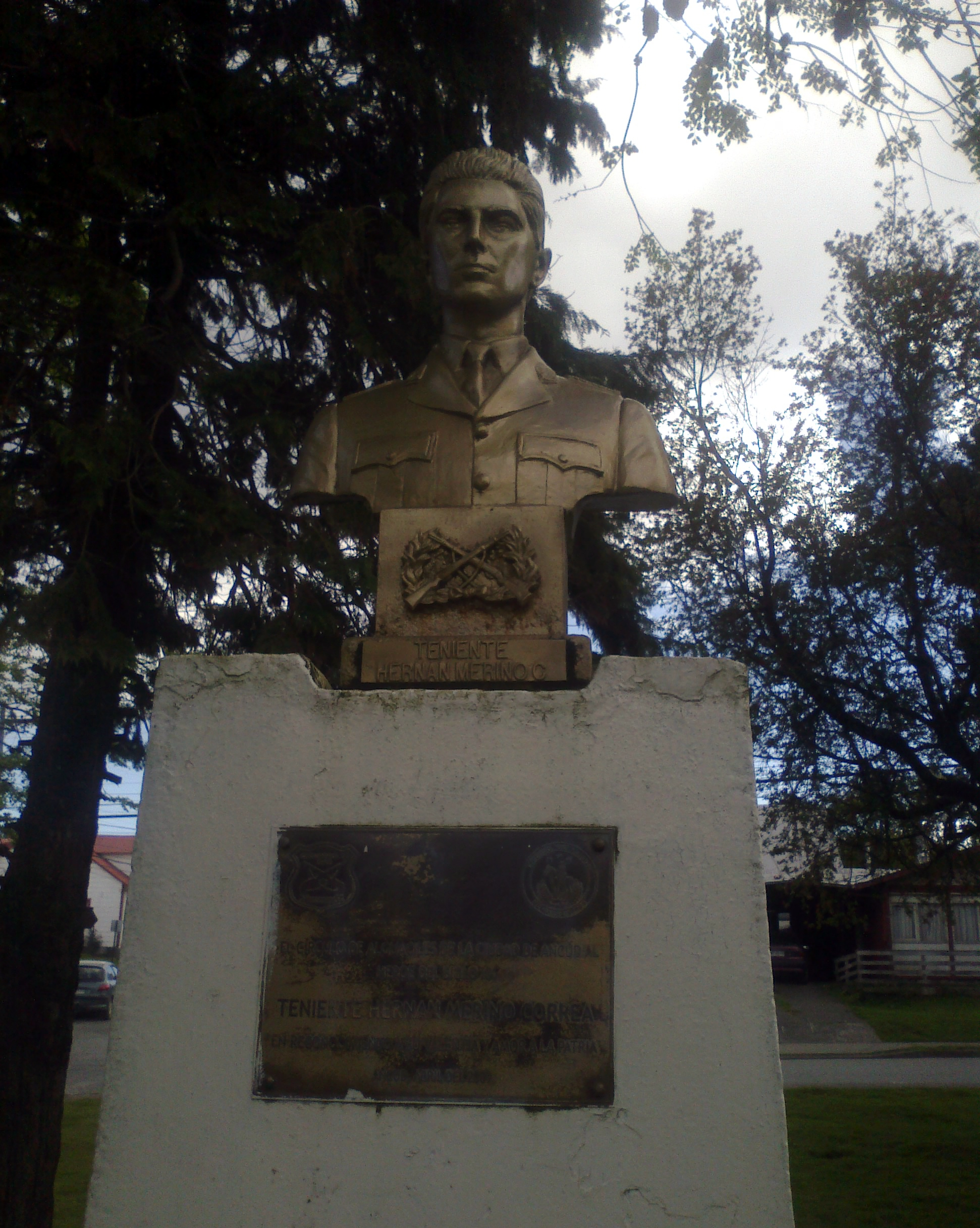 Busto de Hernán Merino en una plaza de Ancud, Chile. En la parte baja del busto dice: "TENIENTE HERNAN MERINO C" y la placa dice: "EL CIRCULO DE ALGUACILES DE LA CIUDAD DE ANCUD AL HEROE DEL HELO [sic] TENIENTE HERNAN MERINO CORREA EN RECONOCIMIENTO A SU VALENTIA Y AMOR A LA PATRIA ANCUD ABRIL DEL 2007"